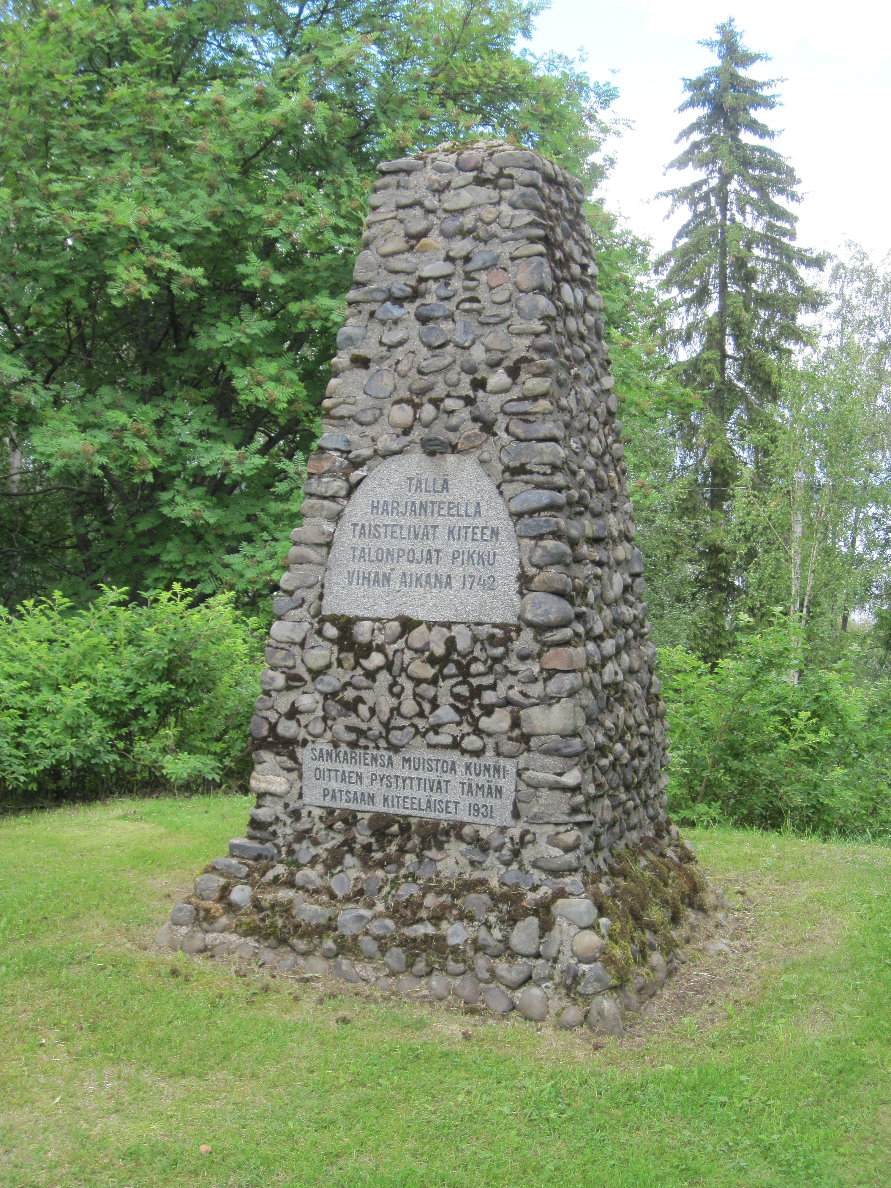 Pikku Vihan muistomerkki Kiteen kirkon lähellä.